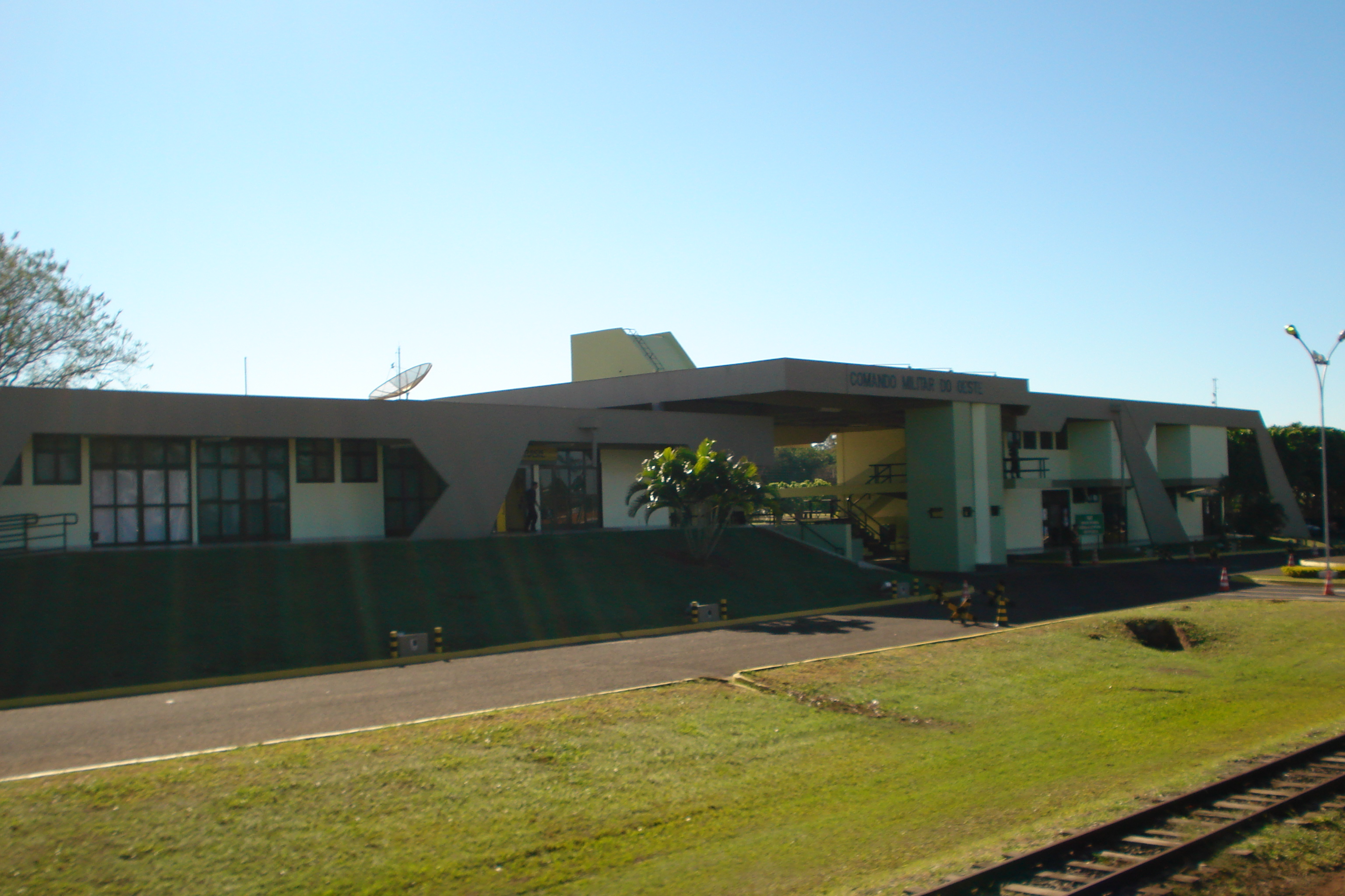 Comando Militar do Oeste